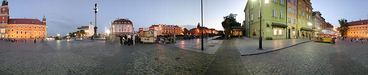 Panoramic photo Warsaw, Poland